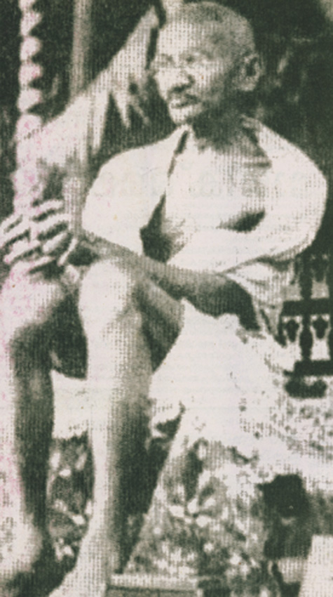 മഹാത്മാഗാന്ധി വൈക്കം സത്യാഗ്രഹത്തിൽ